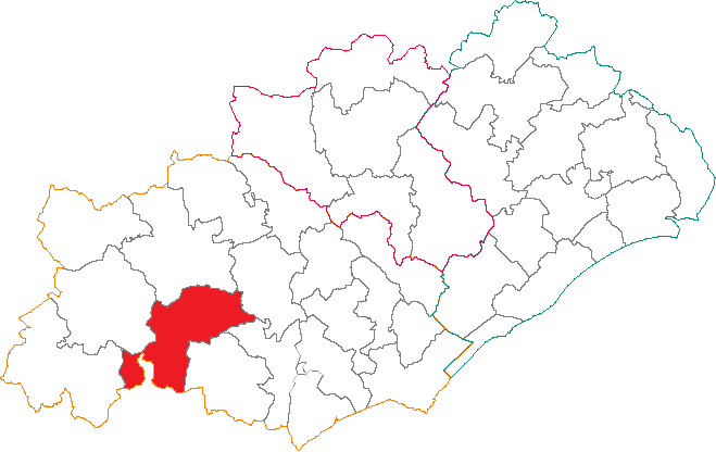 Situation du canton dans le département de l'Hérault.